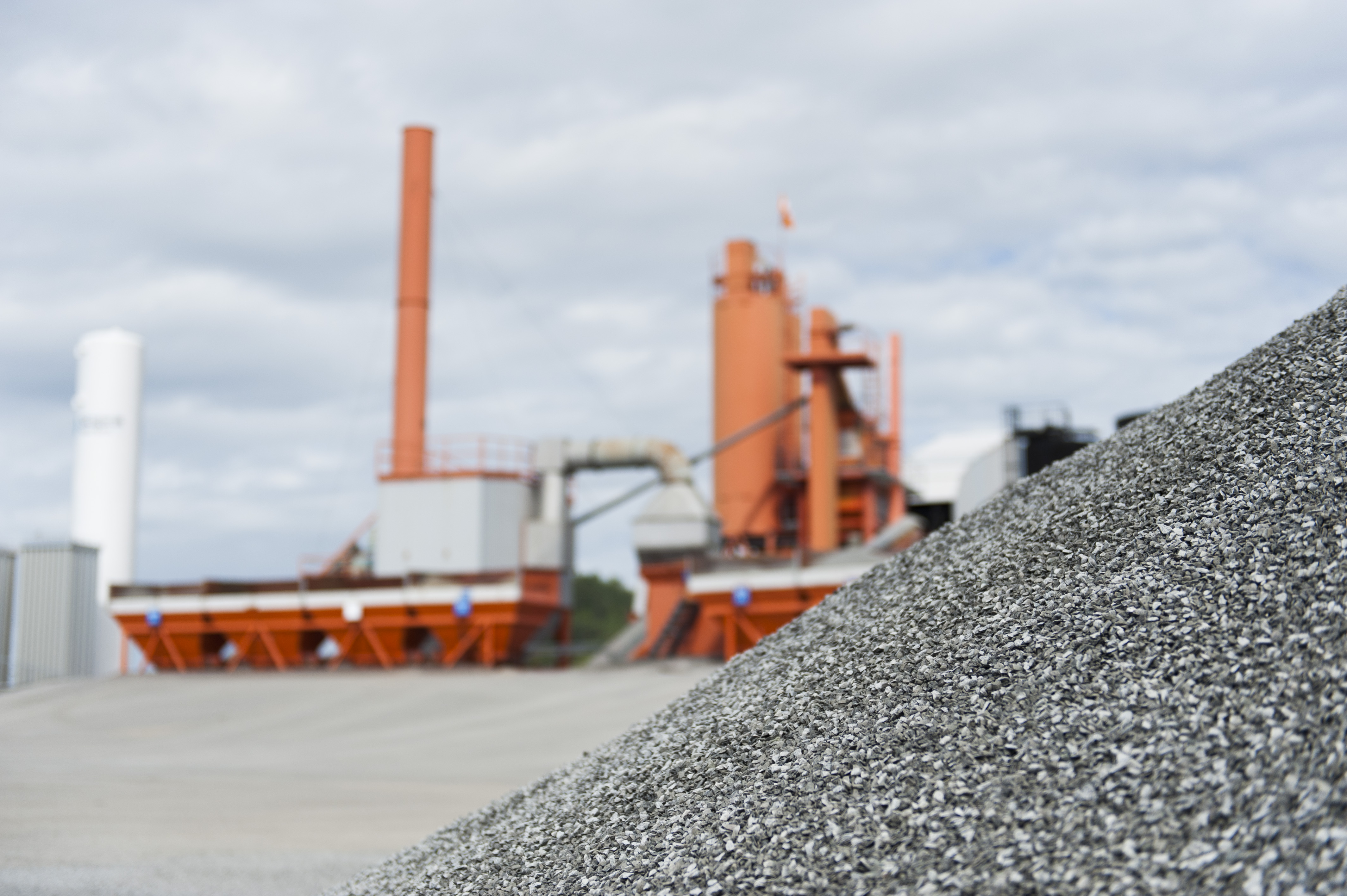 Lemminkäinen Norge AS leverer knuste og siktede steinmaterialer over hele Norge.